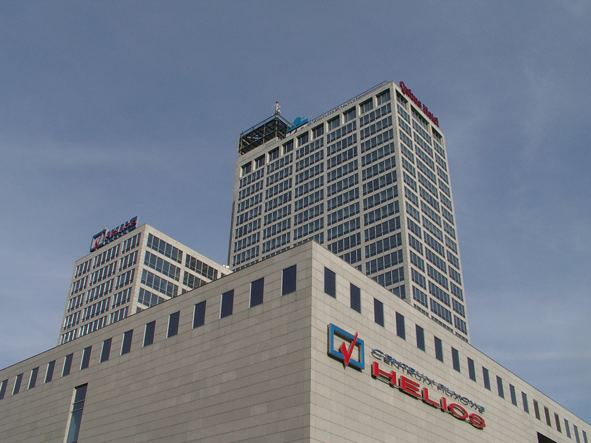 Katowice, gratte-ciel Altus.